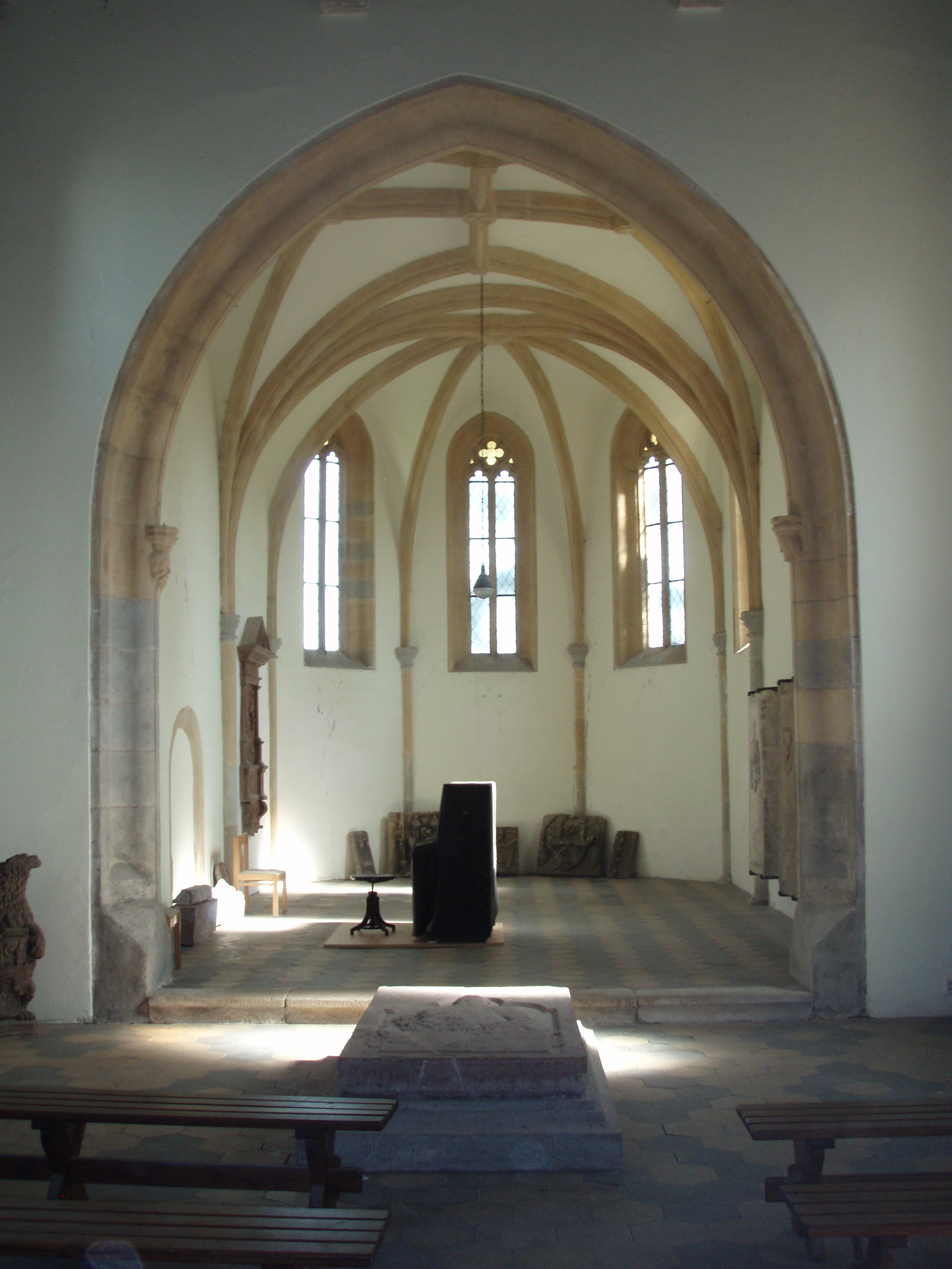 Pohled do kostela.